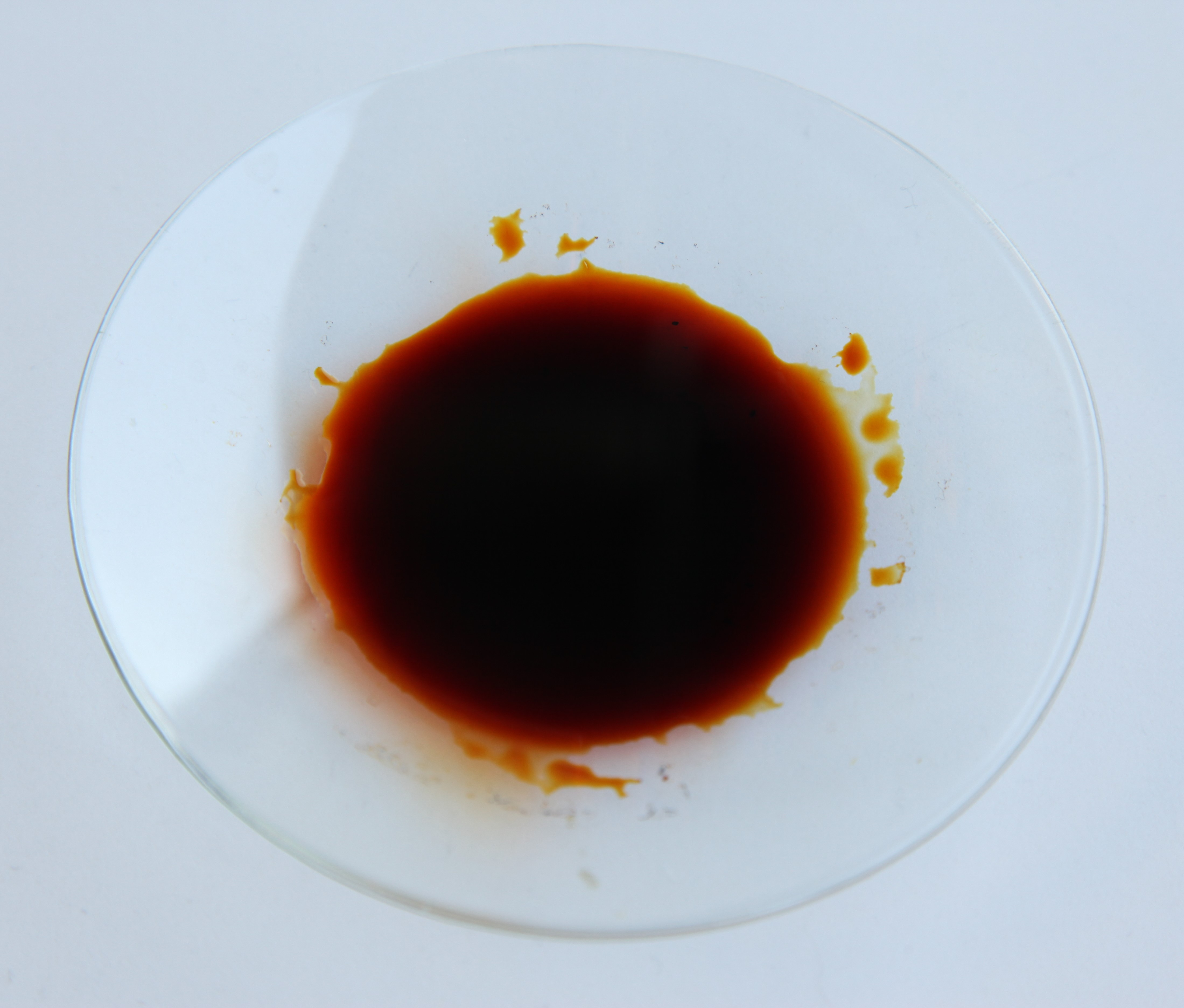 Ethanolische Iodtinktur in einem Uhrglas